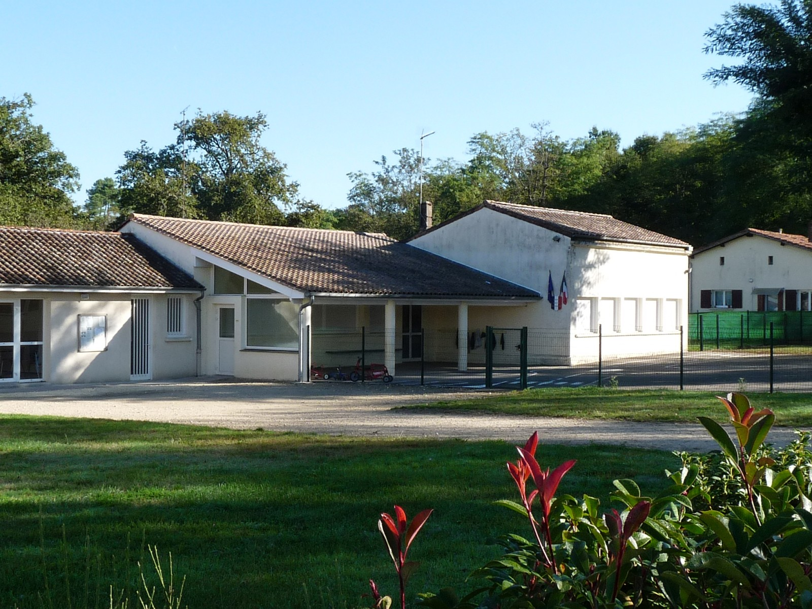 Ecole, Saint-Pierre-du-Palais, Charente-Maritime, France